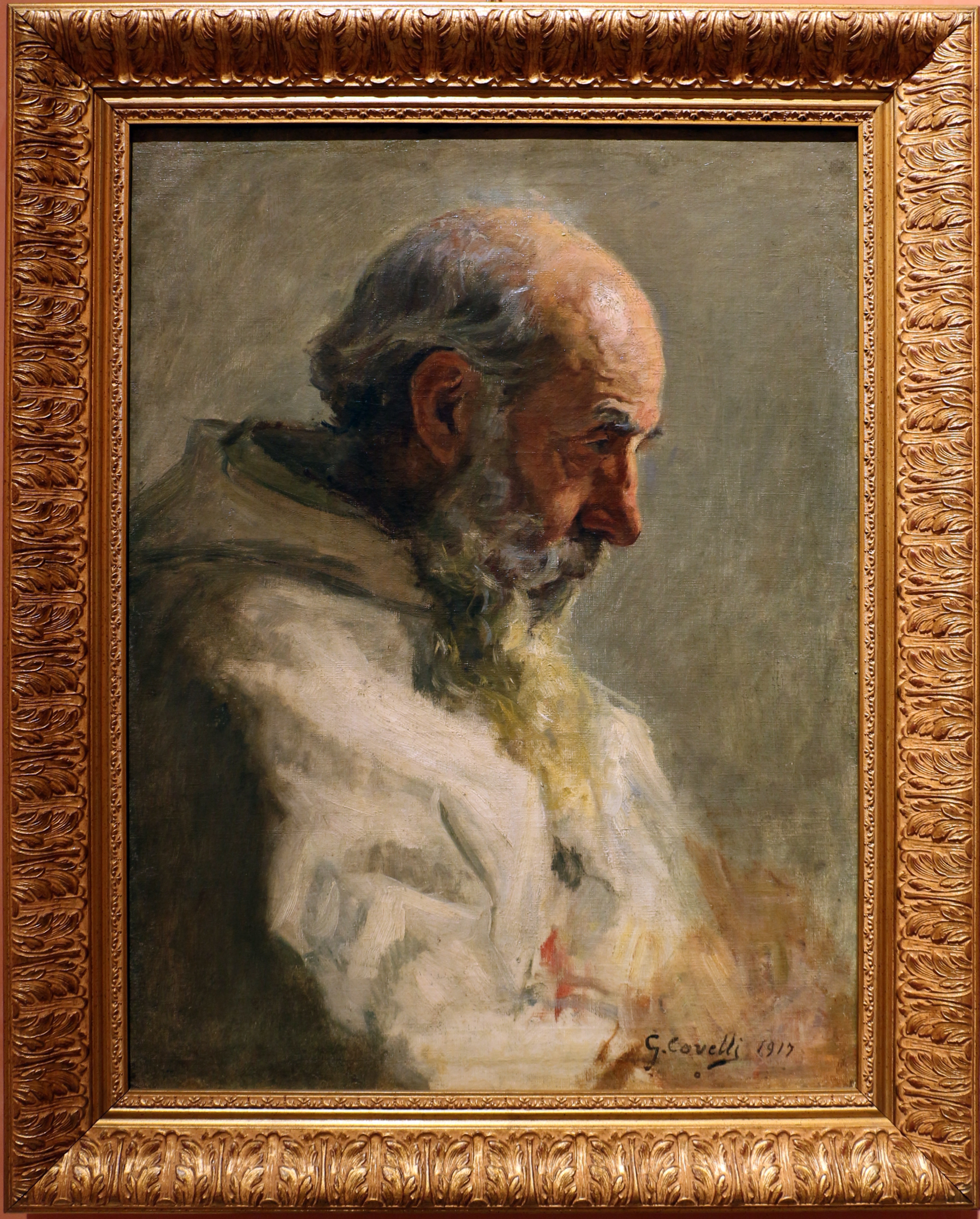 Pinacoteca civica di Reggio Calabria - paintings This is a photo of a monument which is part of cultural heritage of Italy.